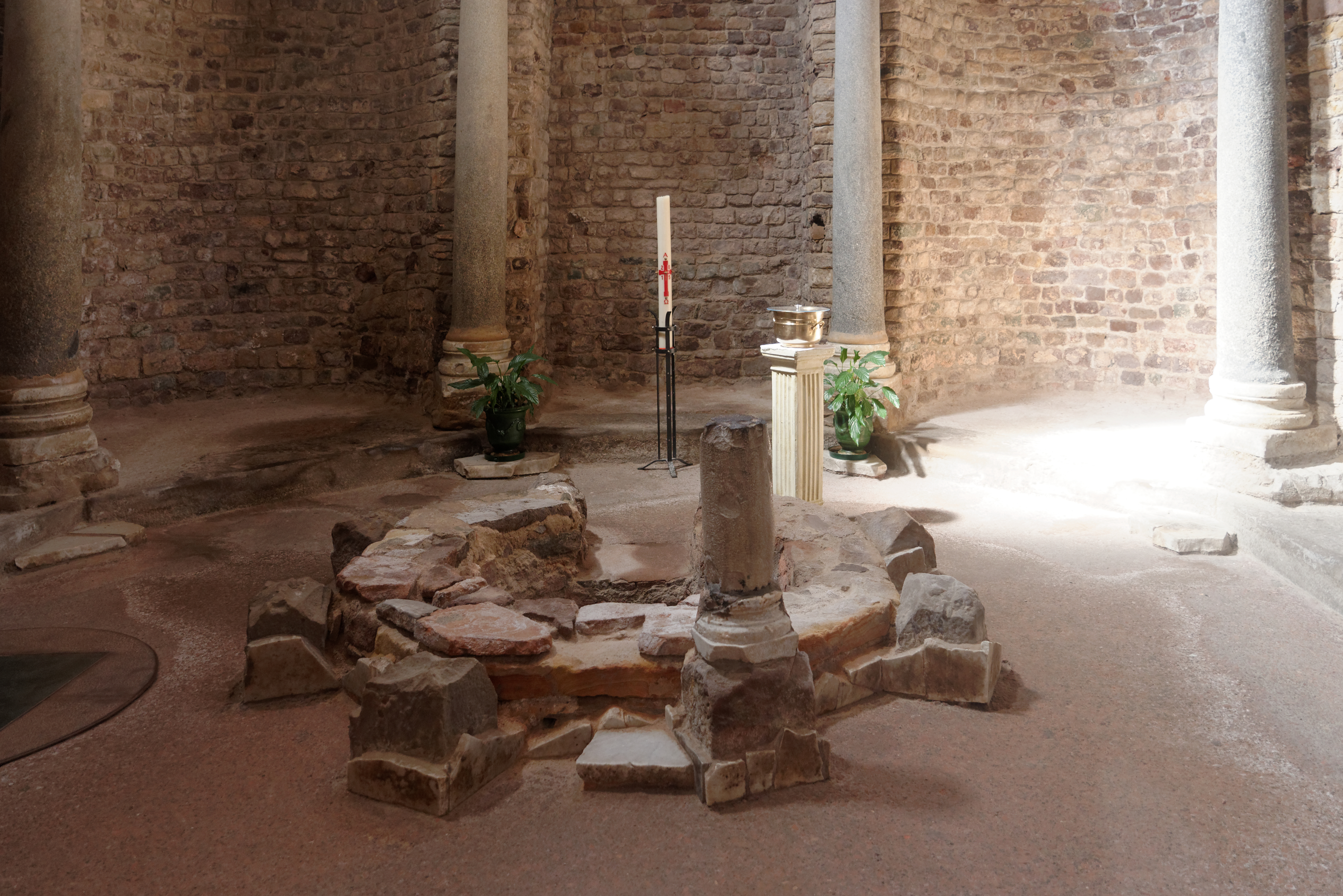 Baptistère de la cathédrale Saint Léonce (Fréjus, Var, France) .